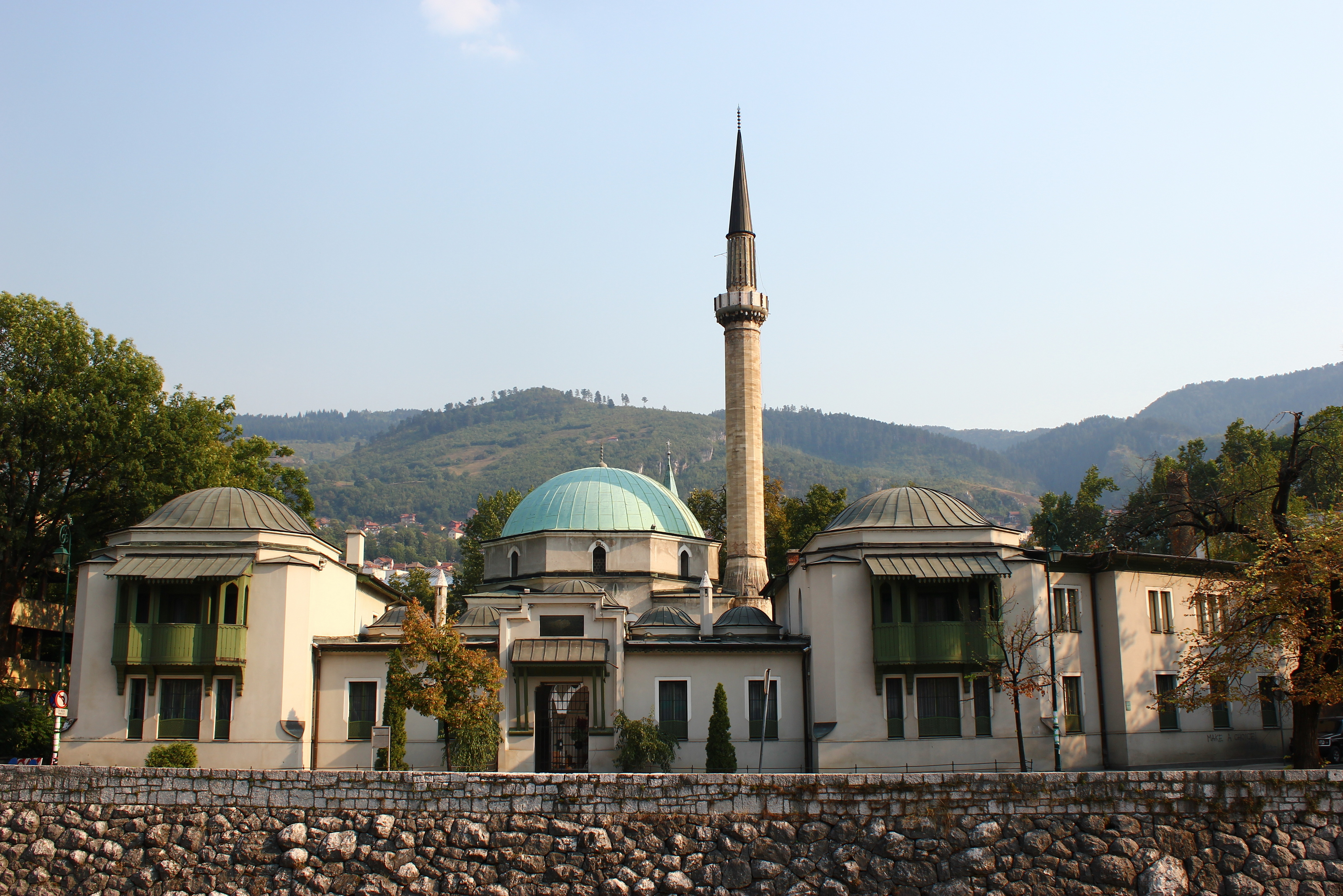 Die sogenannte Kaisermoschee an der Miljacka in Sarajevo.